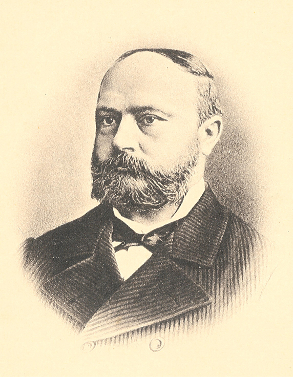 Portrait Rudolf Baumbach, Lichtdruck, Römmler U. Jonas, Dresden, 1888